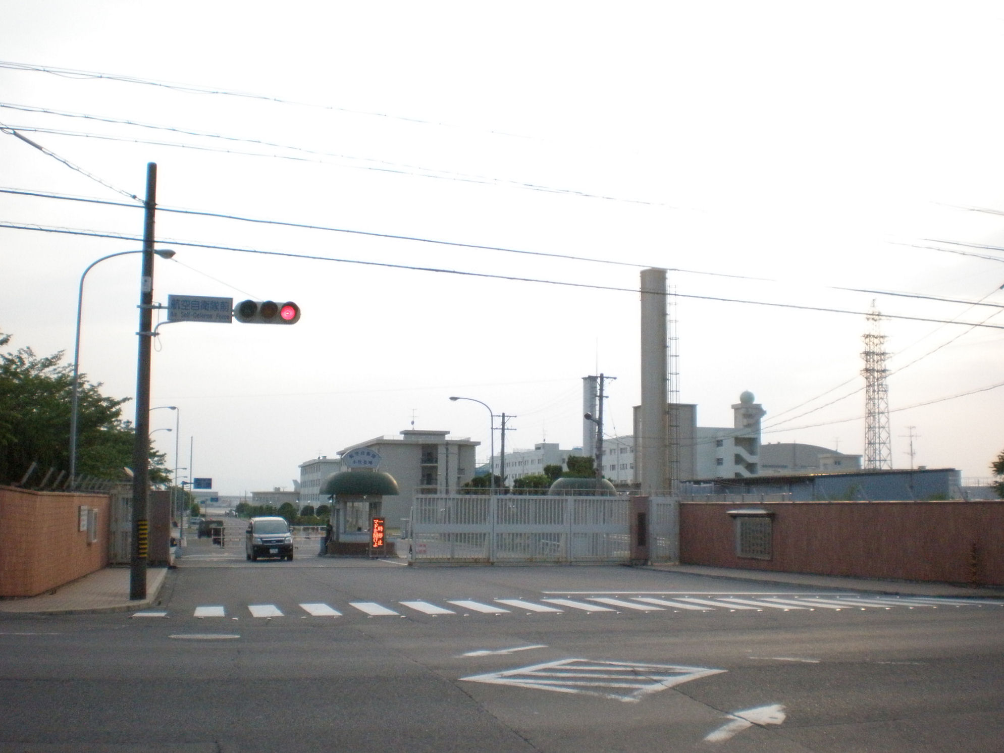 愛知県小牧市にある航空自衛隊小牧基地。